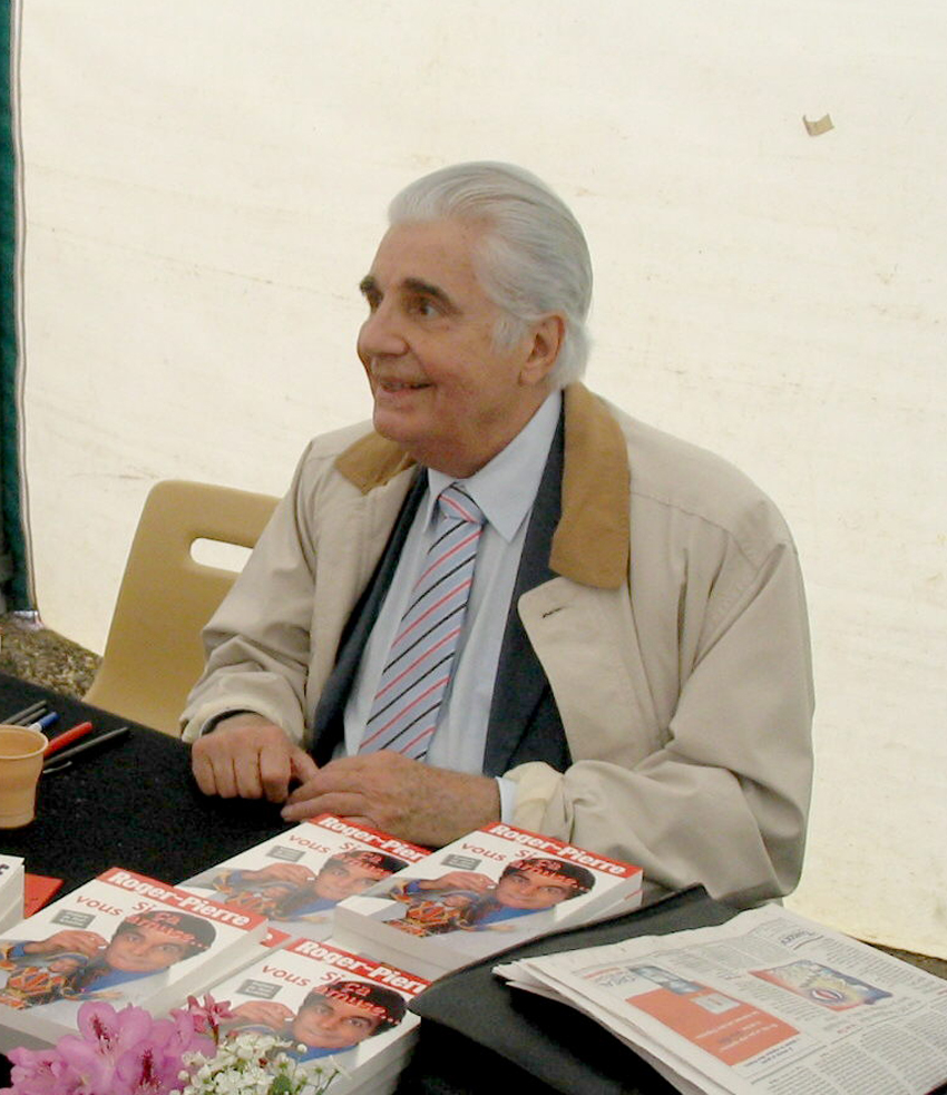 Roger Pierre lors d'une dédicace en salon du livre en 2006